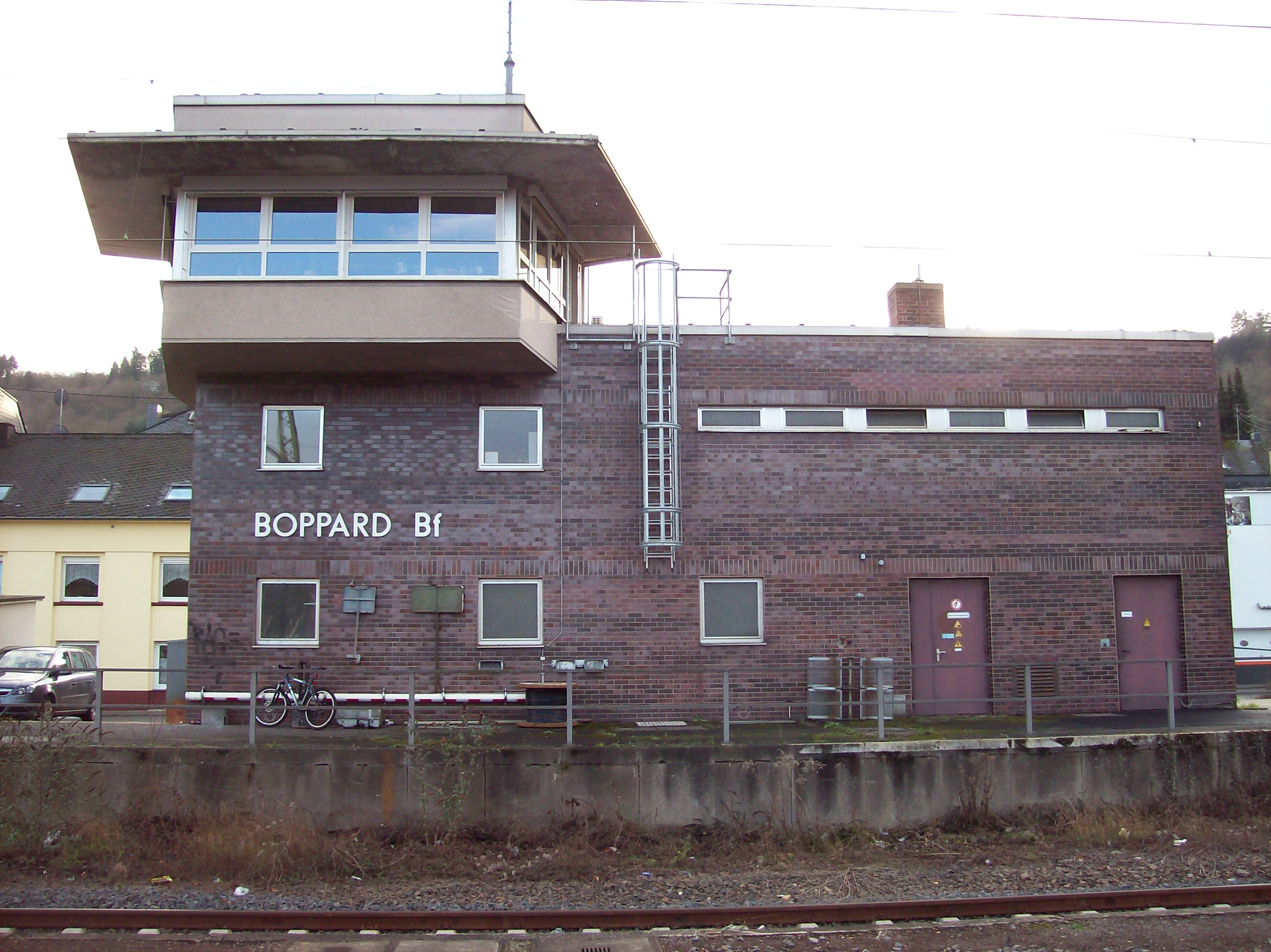 Stellwerk Bf im Bopparder Hauptbahnhof, frontal fotografiert von Bahnsteig 2/3